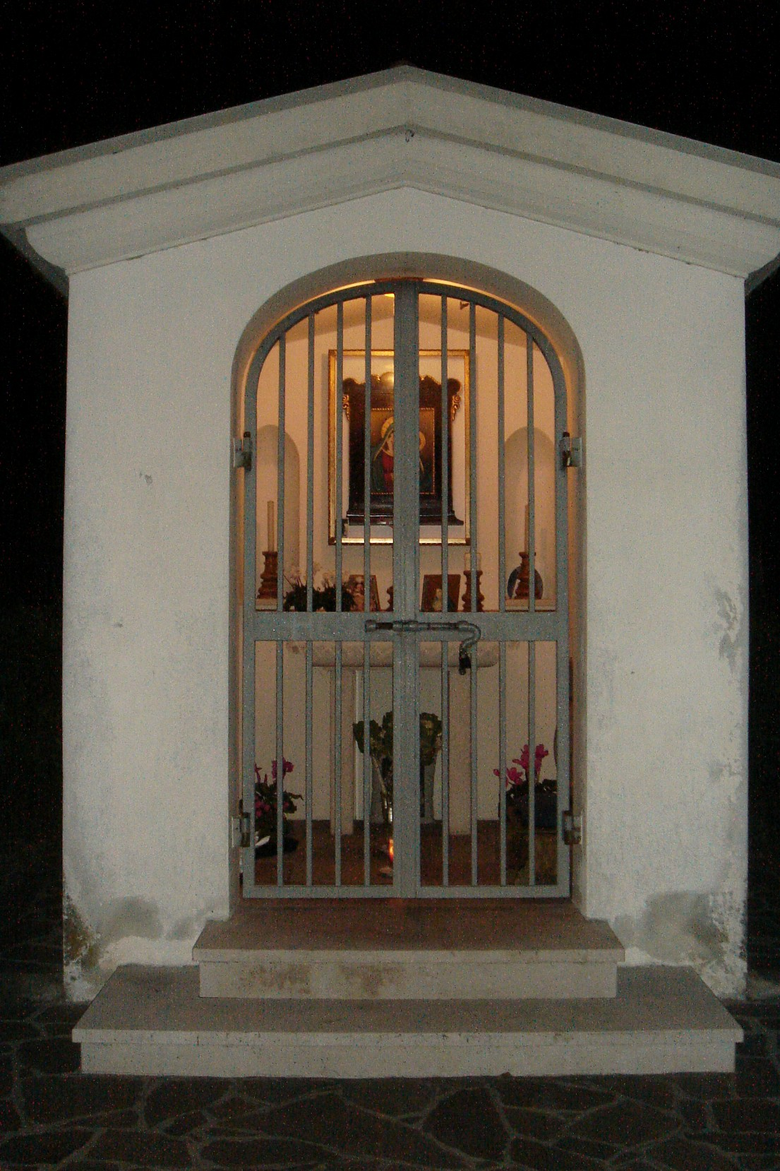 Castello Roganzuolo, capitello di via Cancian, dedicato alla Madonna del Rosario